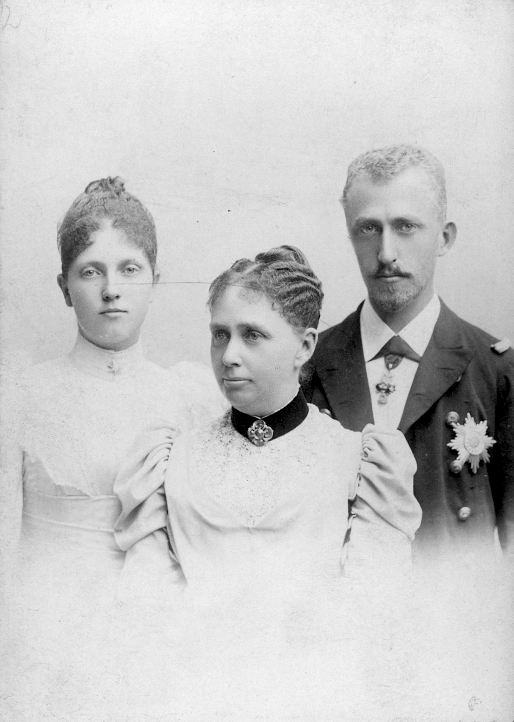 Prinzessin Alicia mit Kinder (Leopold Ferdinand und Luise).